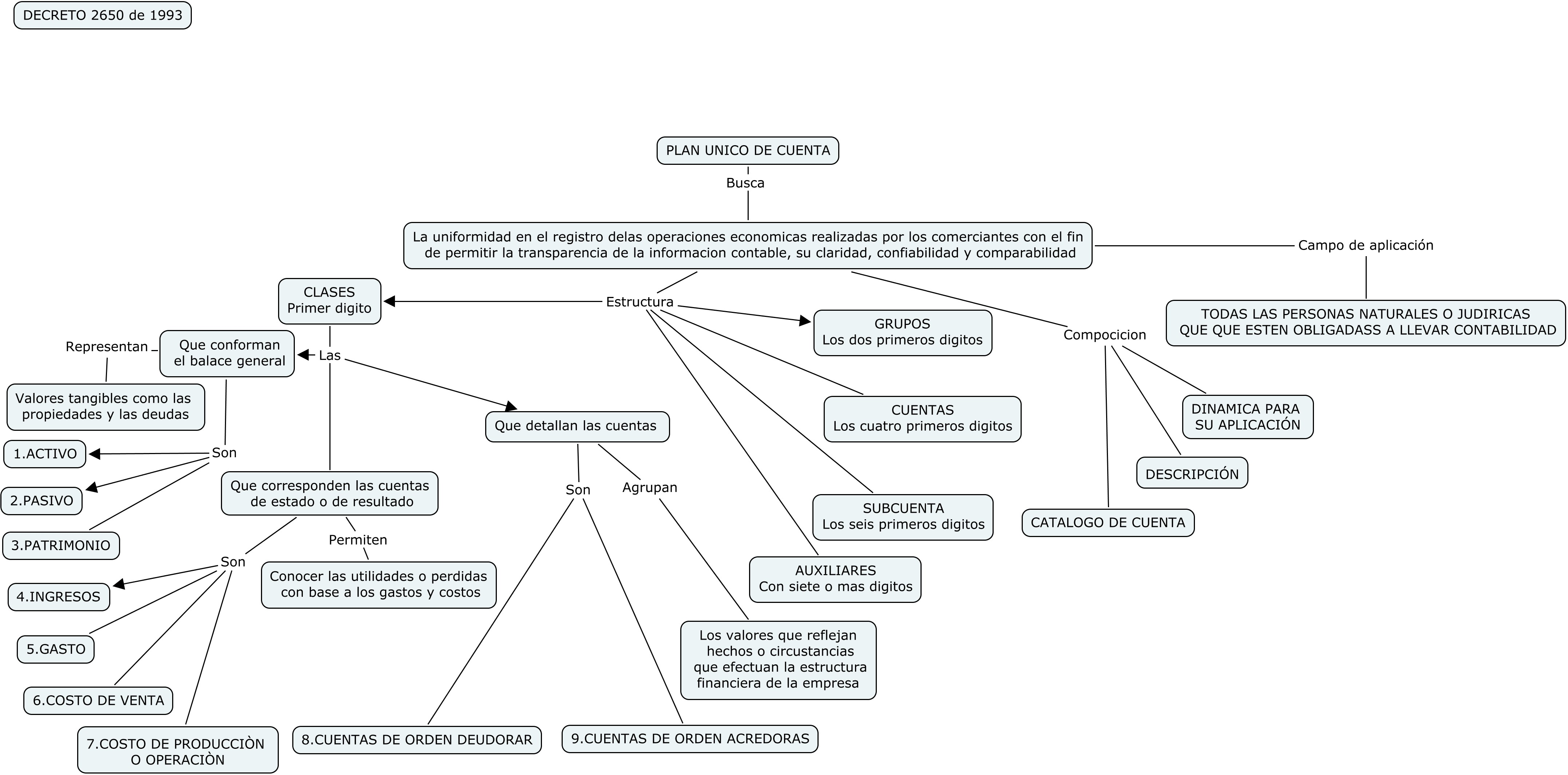 El plan unico de cuenta permite la uniformidad en la contabilidad